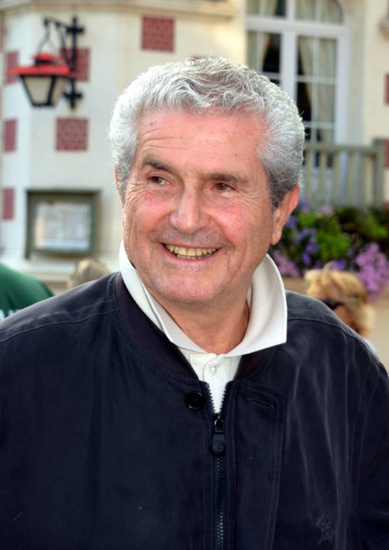 Claude Lelouch au festival de Deauville